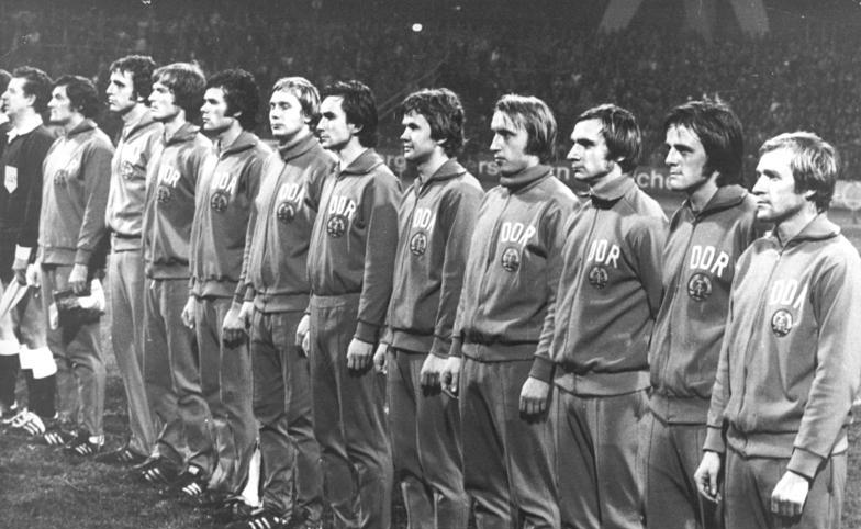 ADN-ZB-Kluge-3.12.76-ma-Dresden: DDR-Fußballnationalmannschaft. Die Fußball-Nationalmannschaft der DDR vor dem Weltmeisterschafts-Qualifikationsspiel gegen die Türkei am 17.11.1976 in Dresden (1:1). Von rechts nach links: Gerd Heydler, Peter Kotte, Klaus Müller, Joachim Streich, Konrad Weise, Reinhard Häfner, Gerd Kische, Hartmut Schade, Udo Schmuck, Torwart Jürgen Croy und Mannschaftskapitän Reinhard Hauck.